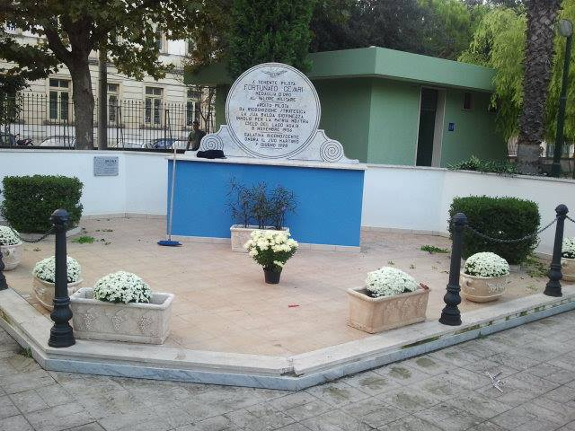 Domenica 21 ottobre 2013 - inaugurazione della lapide commemorativa intitolata al S.Ten Pilota M.O.V.M. Fortunato Cesari - p.zza F. Cesari - Galatina